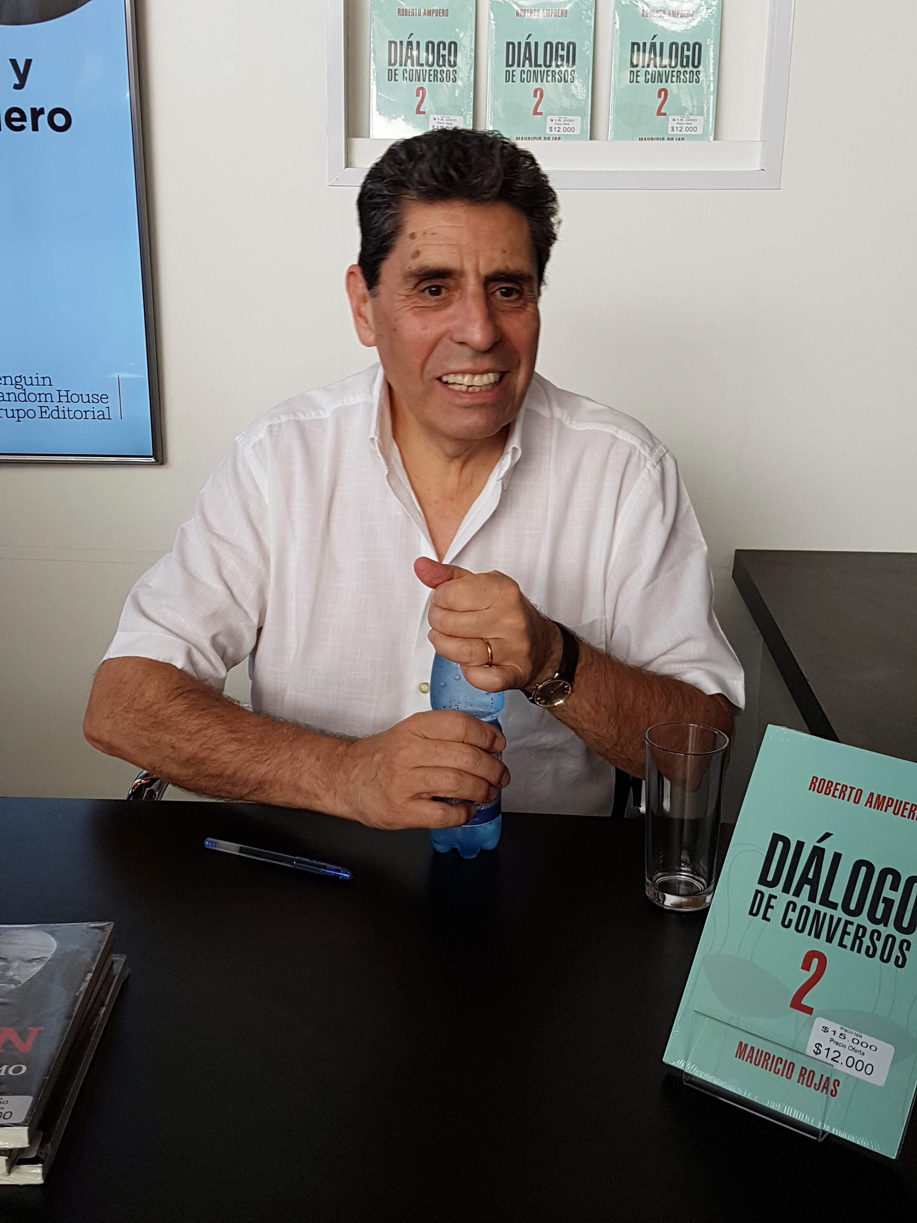 El político, escritor e historiador económico chileno-sueco Mauricio Rojas firma libros en la Feria Internacional del Libro de Santiago 2017.